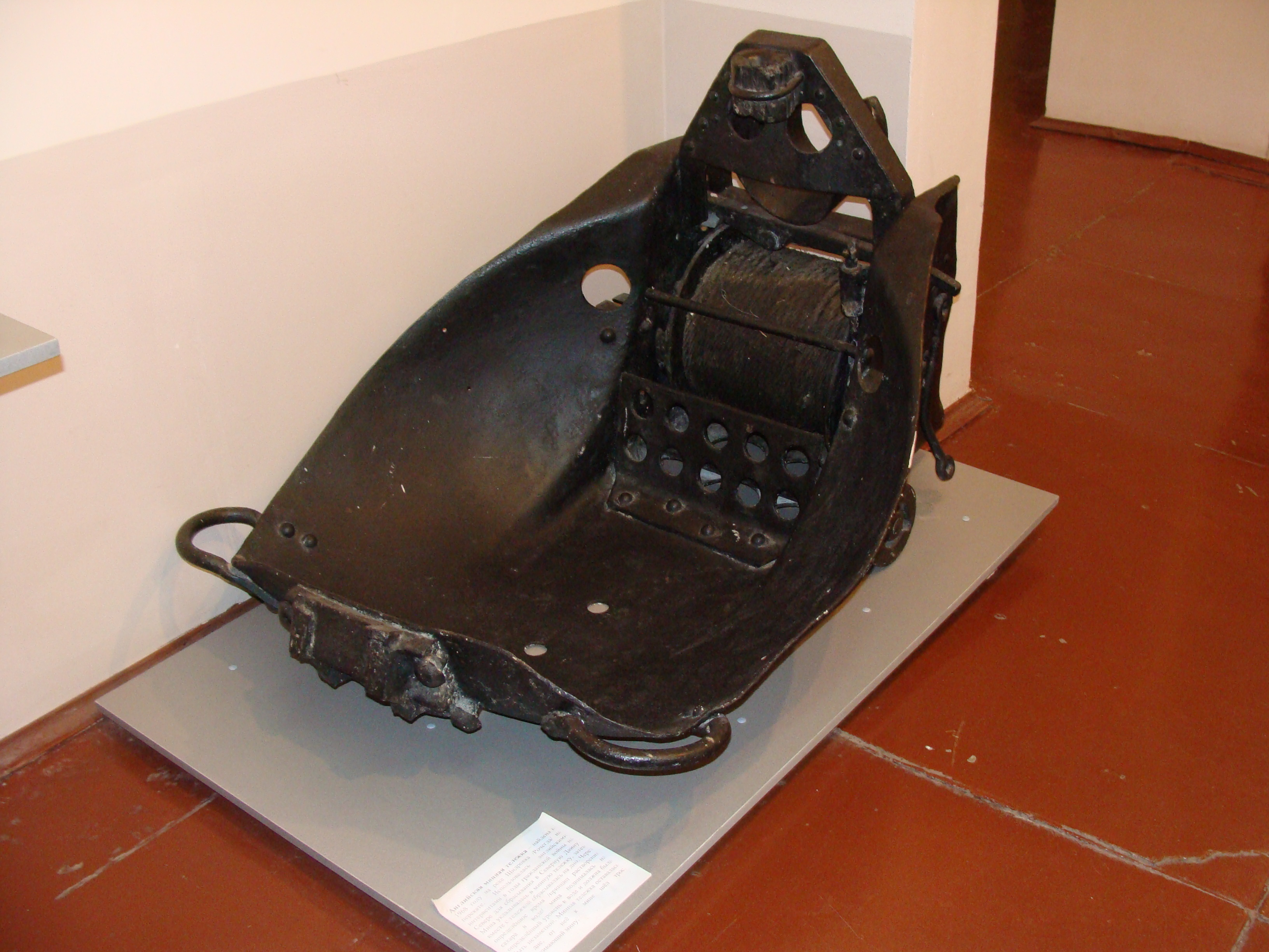 Котласский краеведческий музей. Английская минная тележка - найдена в 1968 году на реке Шидровка (Рочегда) на перекате. Использовалась английскими интервентами в годы гражданской войны на Севере для сбрасывания мин в Северную Двину.